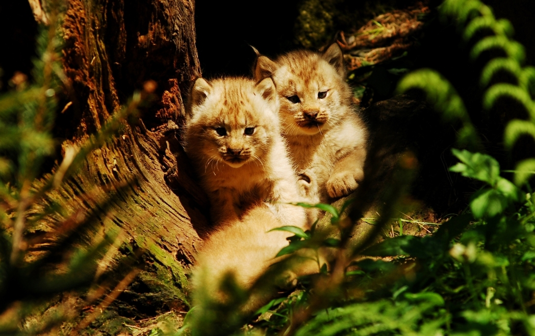 Mláďata rysa kanadského narozená dne 15. května 2008 v ostravské zoo.